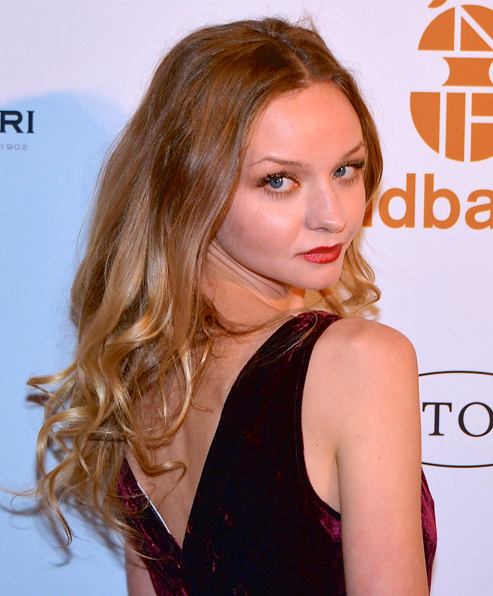 Anna Åström på på Guldbaggegalan 2013 den 21 januari 2013.